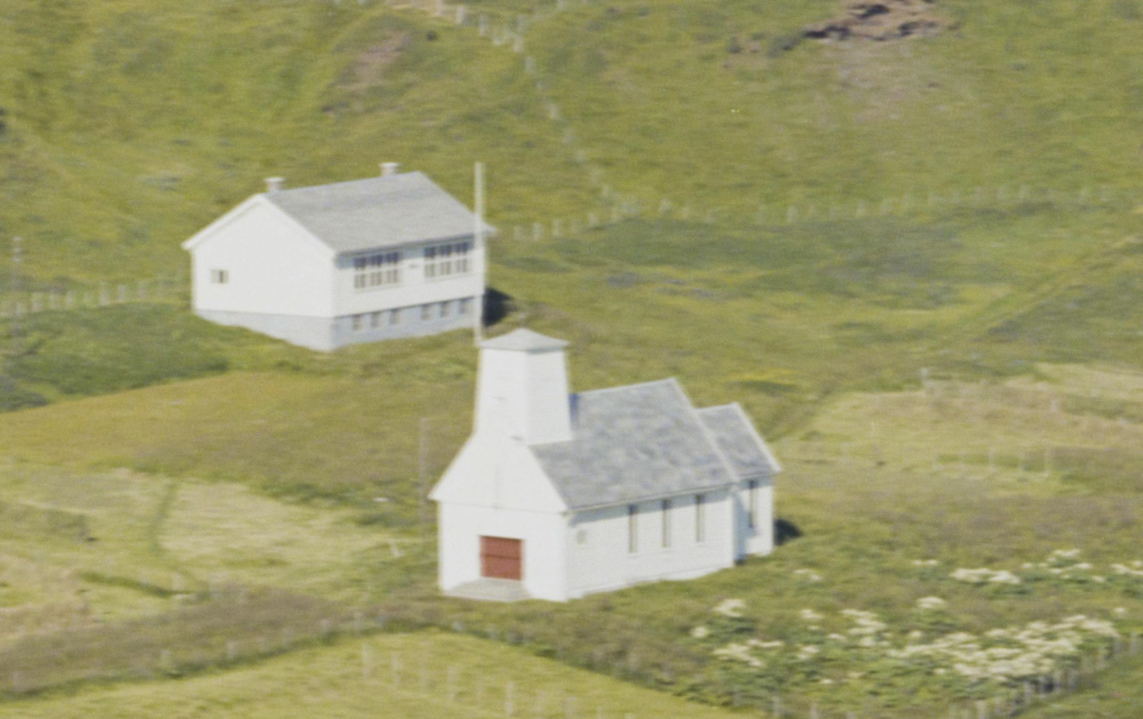 Loppa kirke. Foto: Widerøes Flyveselskap, fra Nasjonalbibliotekets samling.